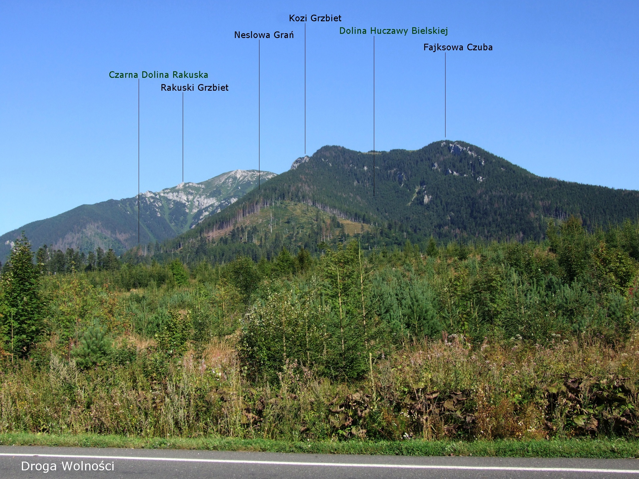 Widok z Drogi Wolności Tatrzańska Kotlina-Kieżmarskie Żłoby